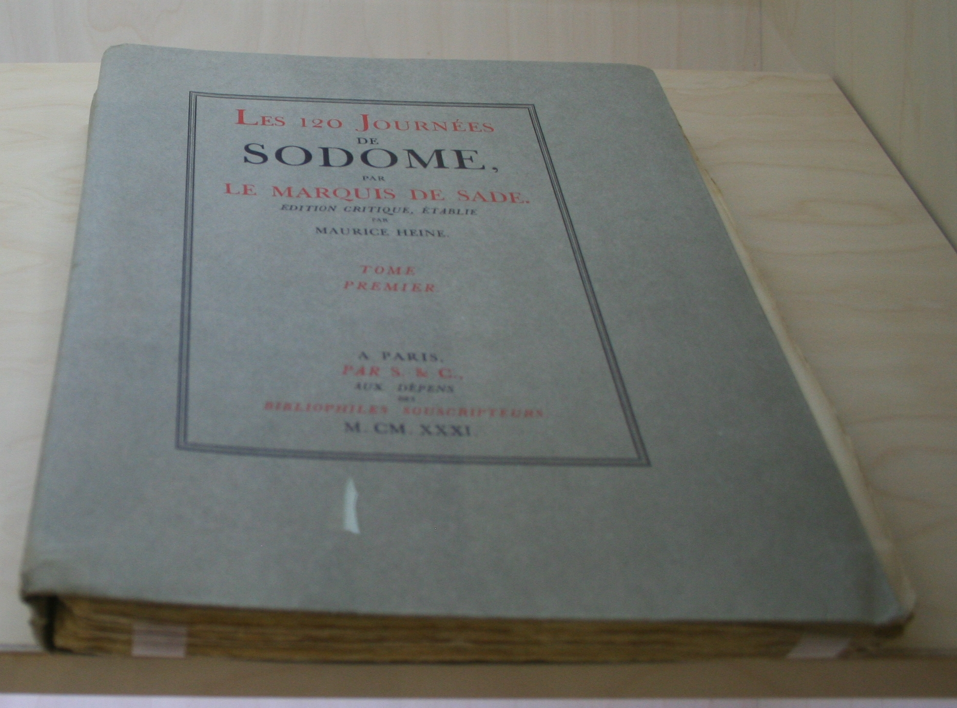 Première édition en 1931 par Maurice Heine, limitée aux 360 « bibliophiles souscripteurs » pour éviter la censure, des Cent Vingt Journées de Sodome du marquis de Sade.